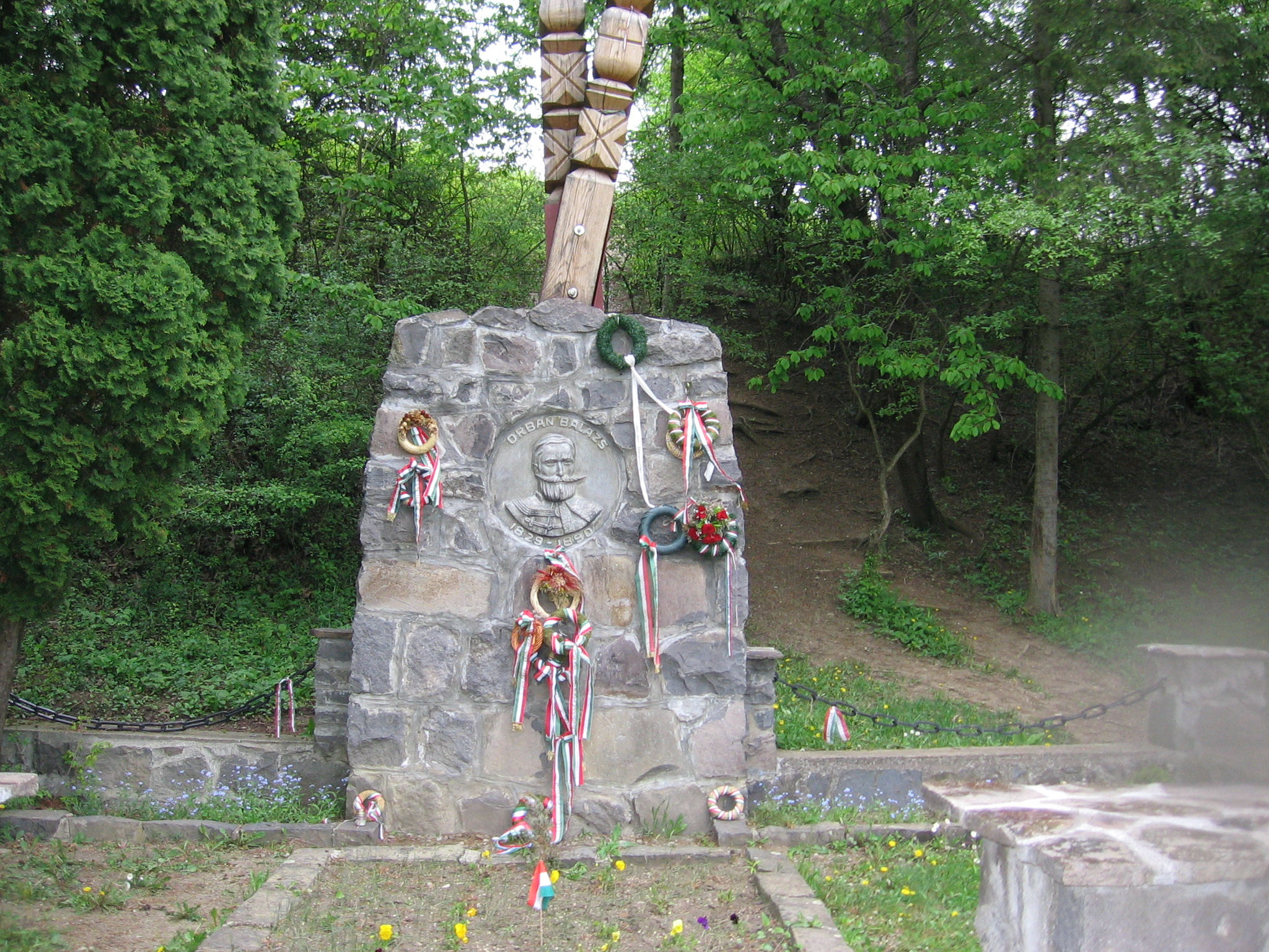 Grave of Orbán Balázs